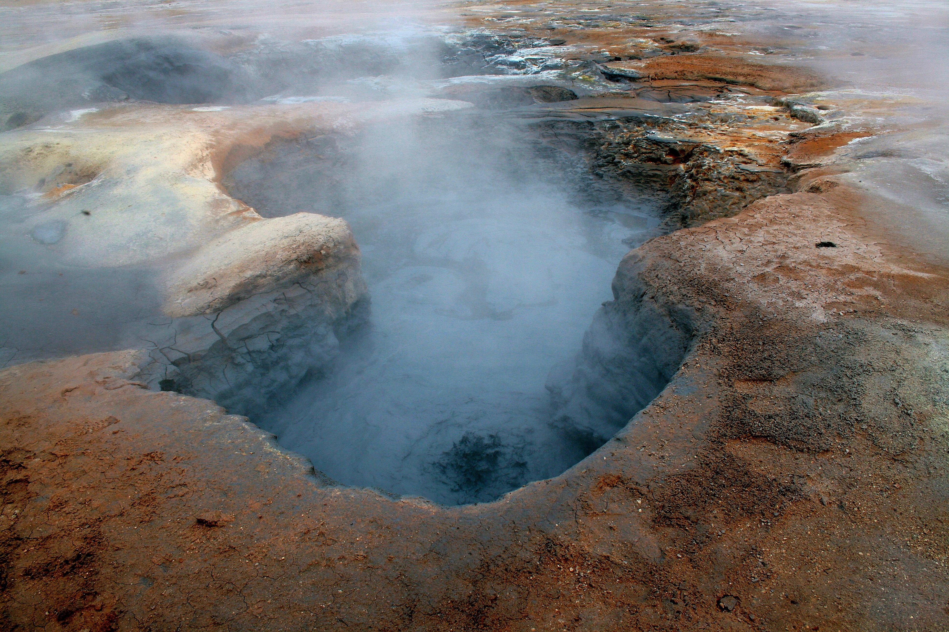 Fumarole_im_Feld_Námafjall Hverir